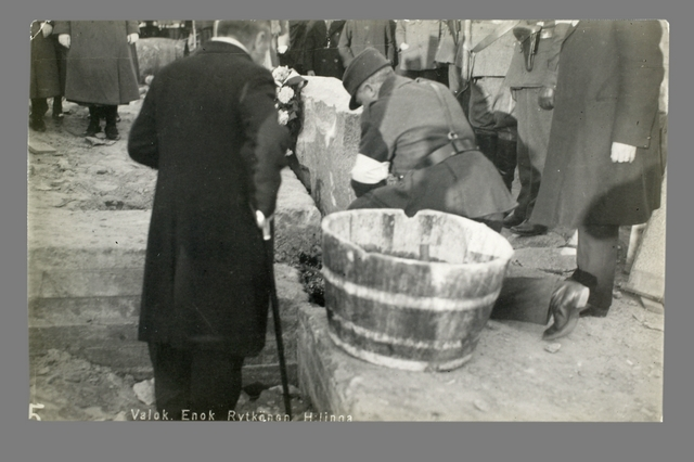 Hämeenlinnan suojeluskuntatalon Hämeen Suojan peruskiven muuraus